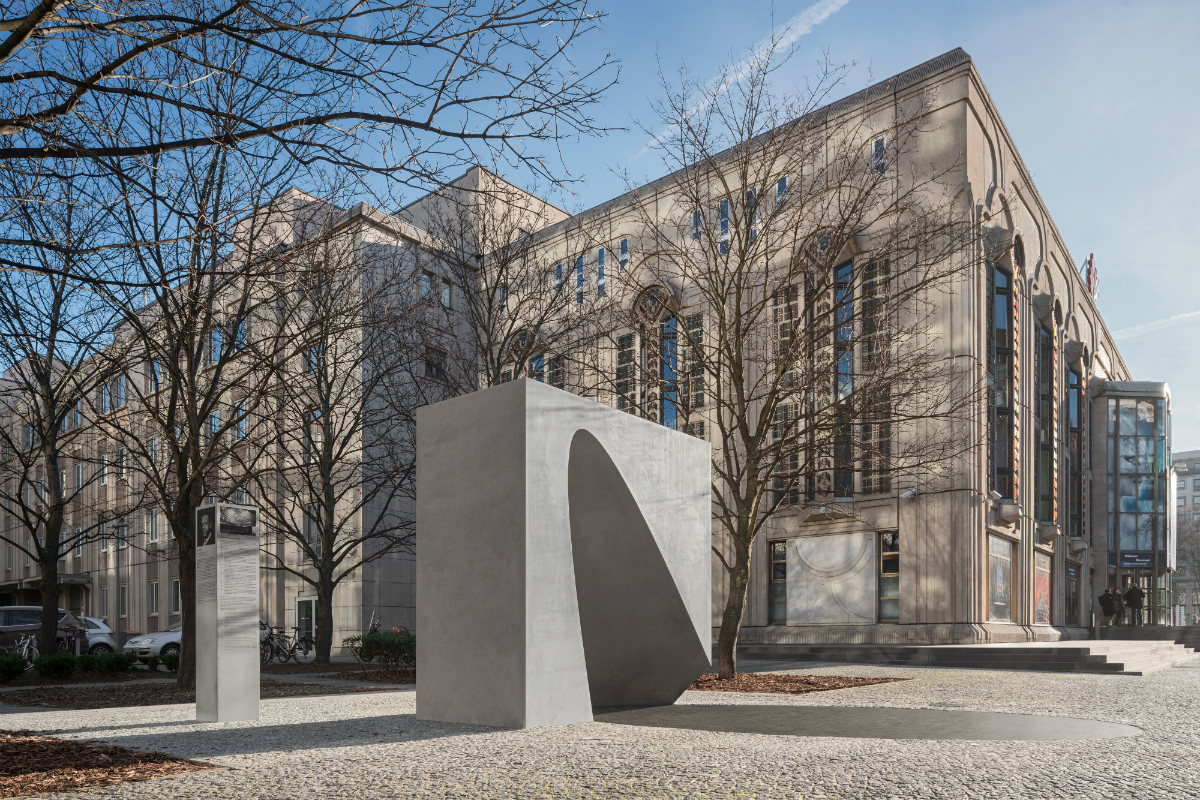 Denkzeichen für die Gründungsväter des Friedrichstadt-Palastes; Foto von Adrian Schulz 1200x800px